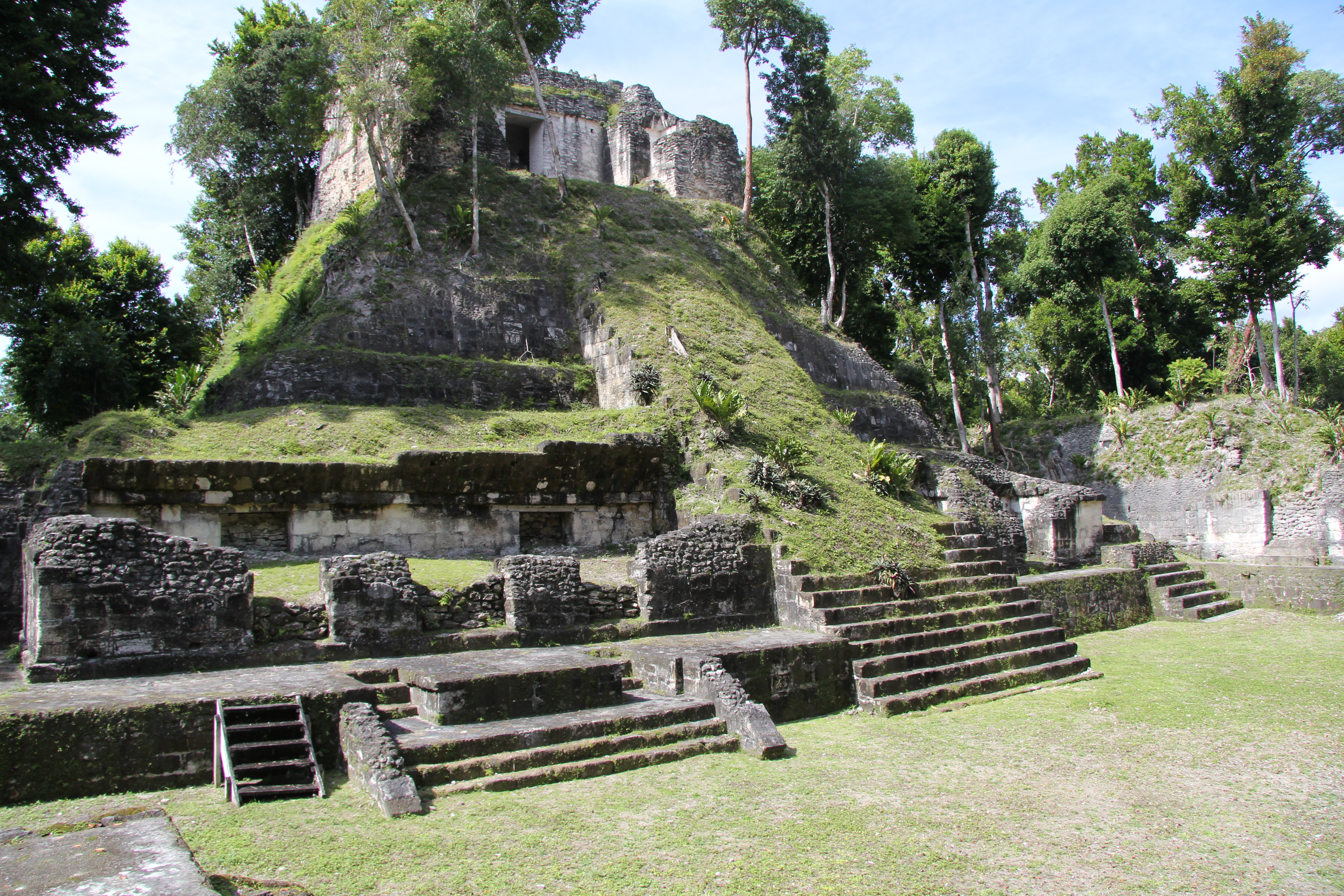 Templo en Nakum, Parque Yaxhá Nakum Naranjo, Reserva de la Biosfera Maya, Petén, Guatemala